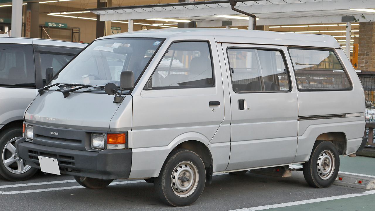 Nissan Largo Van (VGC22)